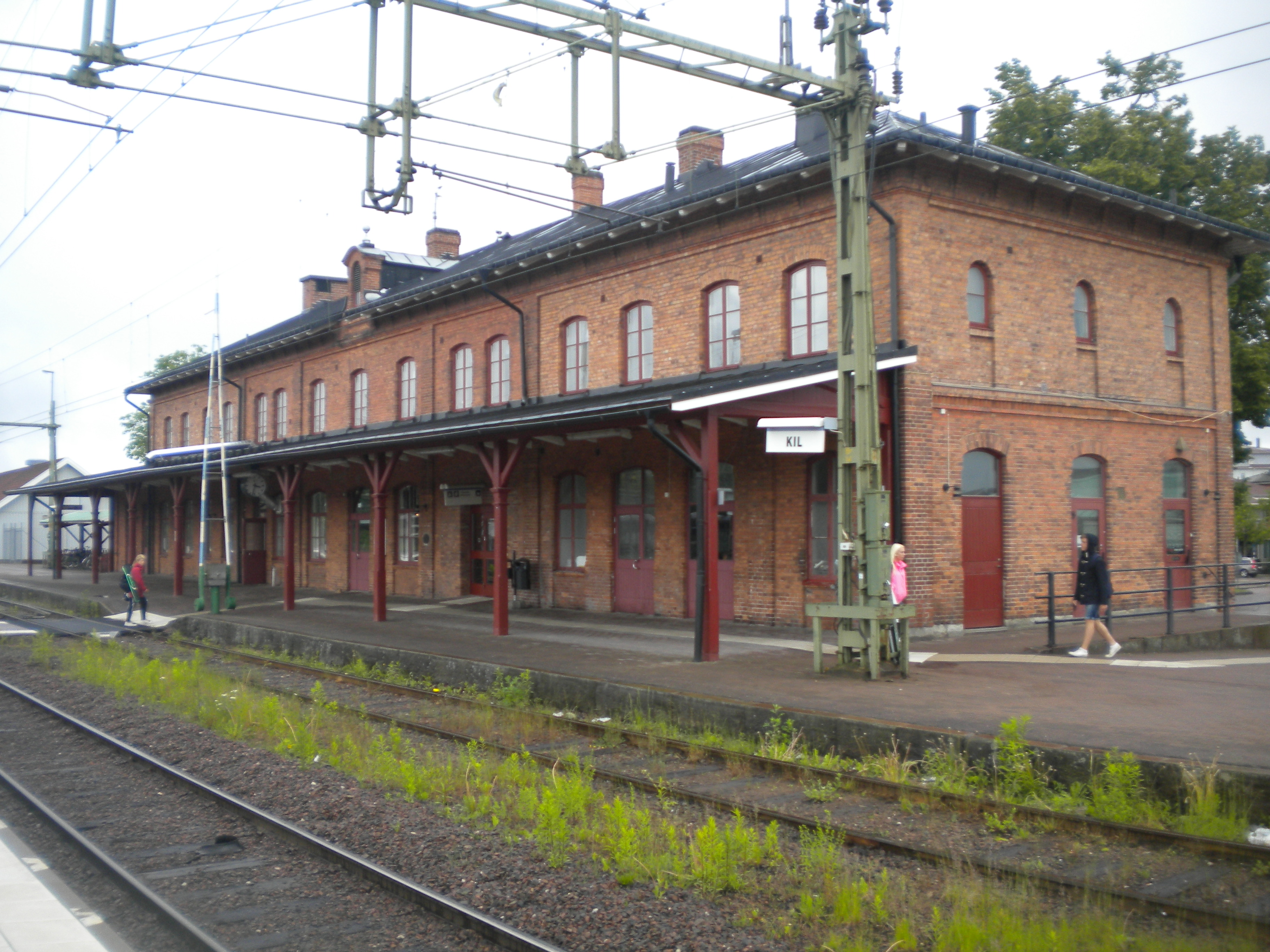 Stationshuset i Kil.